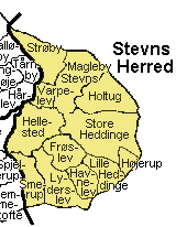 Stevns Herred Præstø Amt , Denmark. Map by Svend-Erik Christiansen, edited by user:Nico-dk .